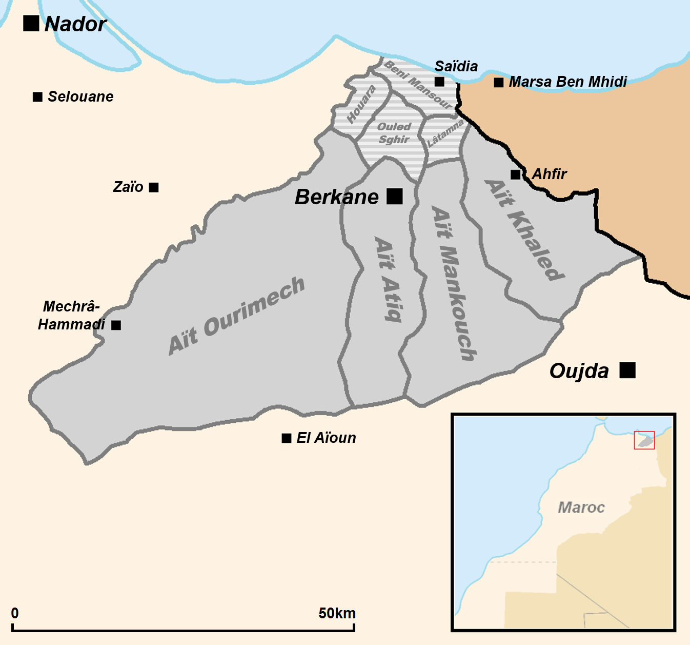 Carte le localisation des tribus Beni SnassenOwn made map